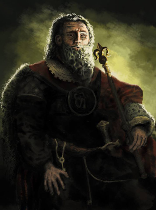 Współczesne opracowanie rysunku Jana Matejki zatytułowanego "Mieszko III Stary".